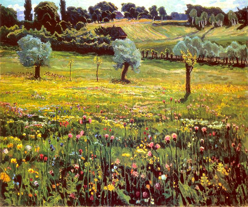 Łąka